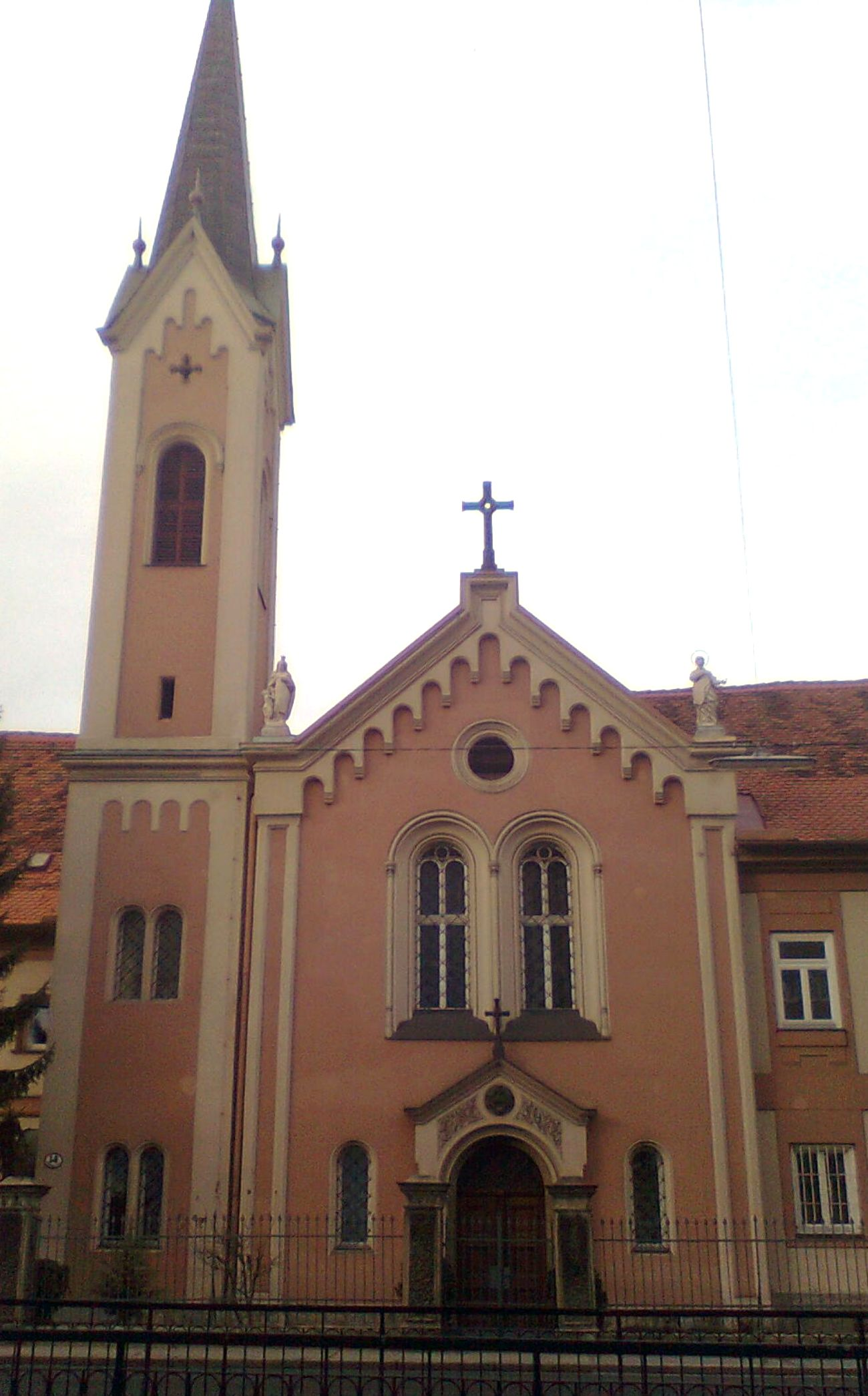 Elisabethinenkirche Graz